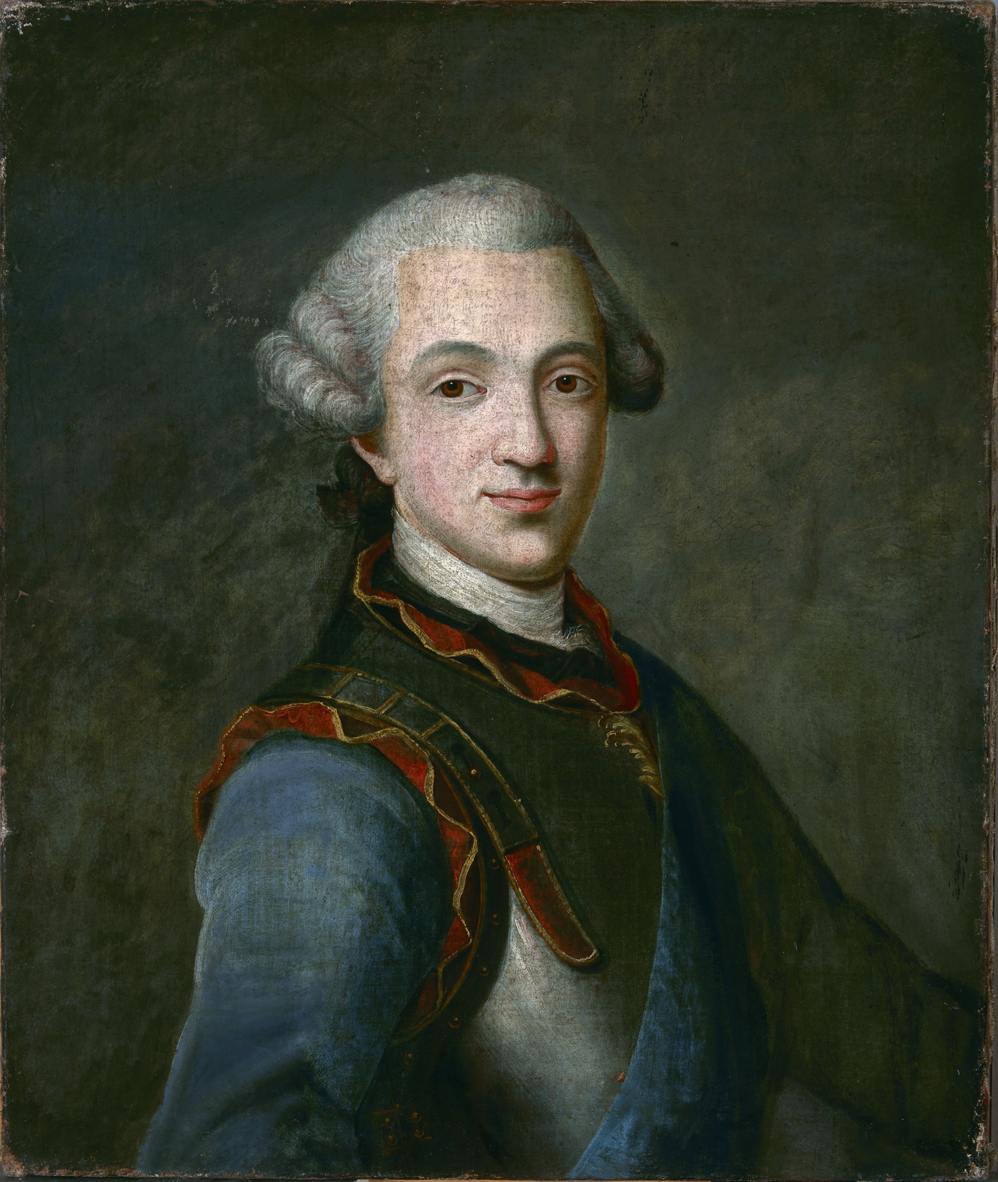 Беларуская (тарашкевіца): Партрэт Юзэфа Паўліна Сангушкі (Juzef Paŭlin Sanguška)